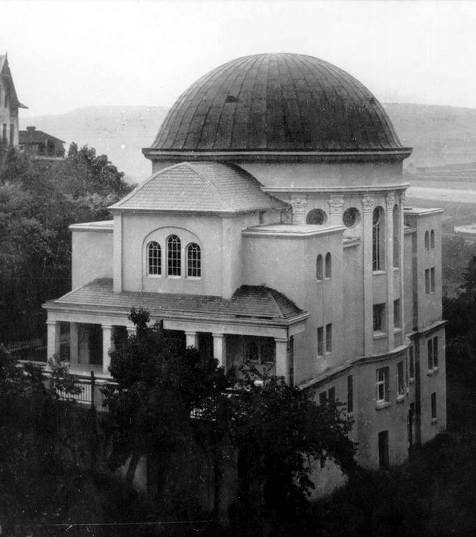 Ansicht der Synagoge in Bad Wildungen von Westen kurz nach ihrer Erbauung 1914.